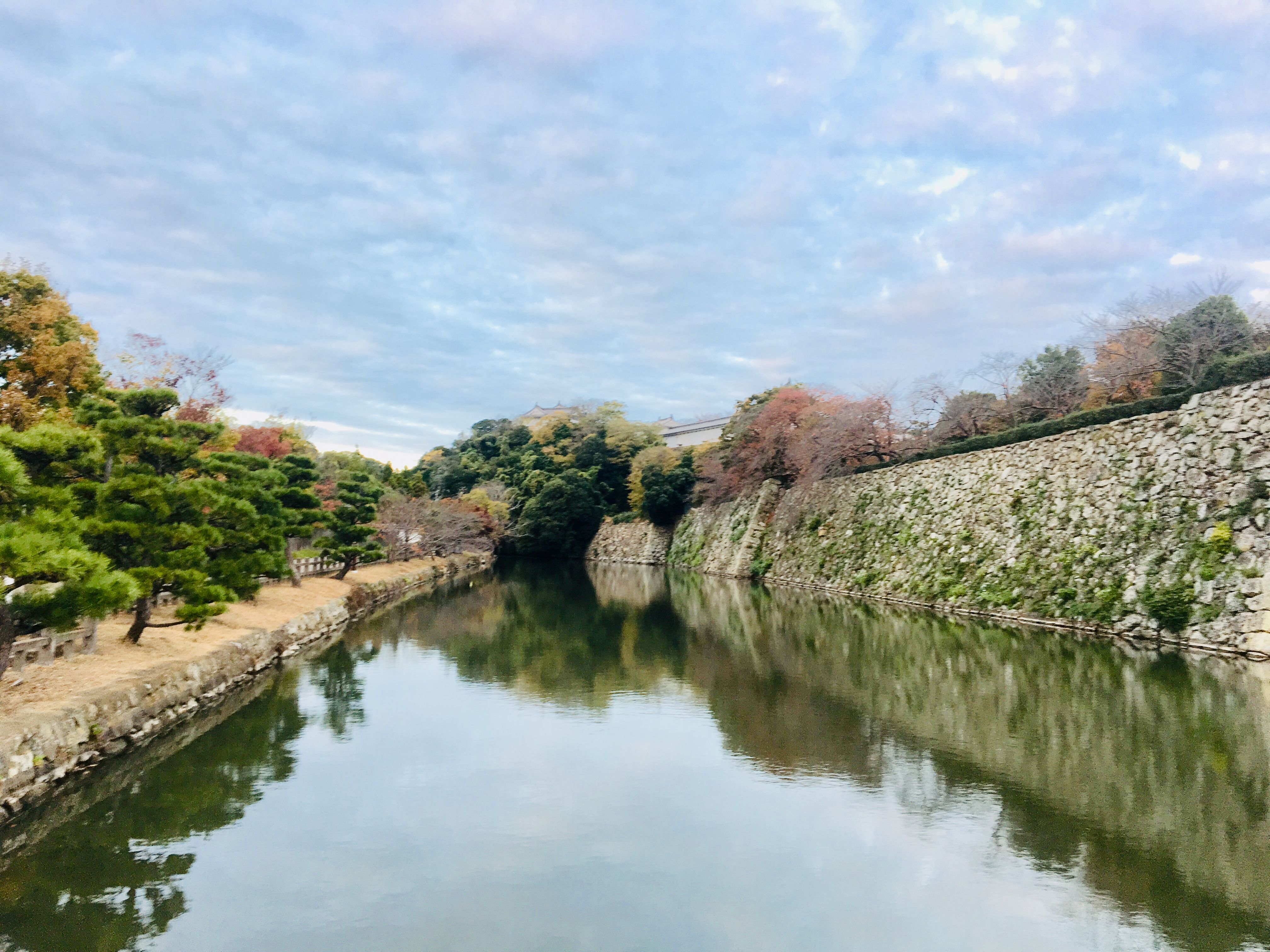 城壁と濠